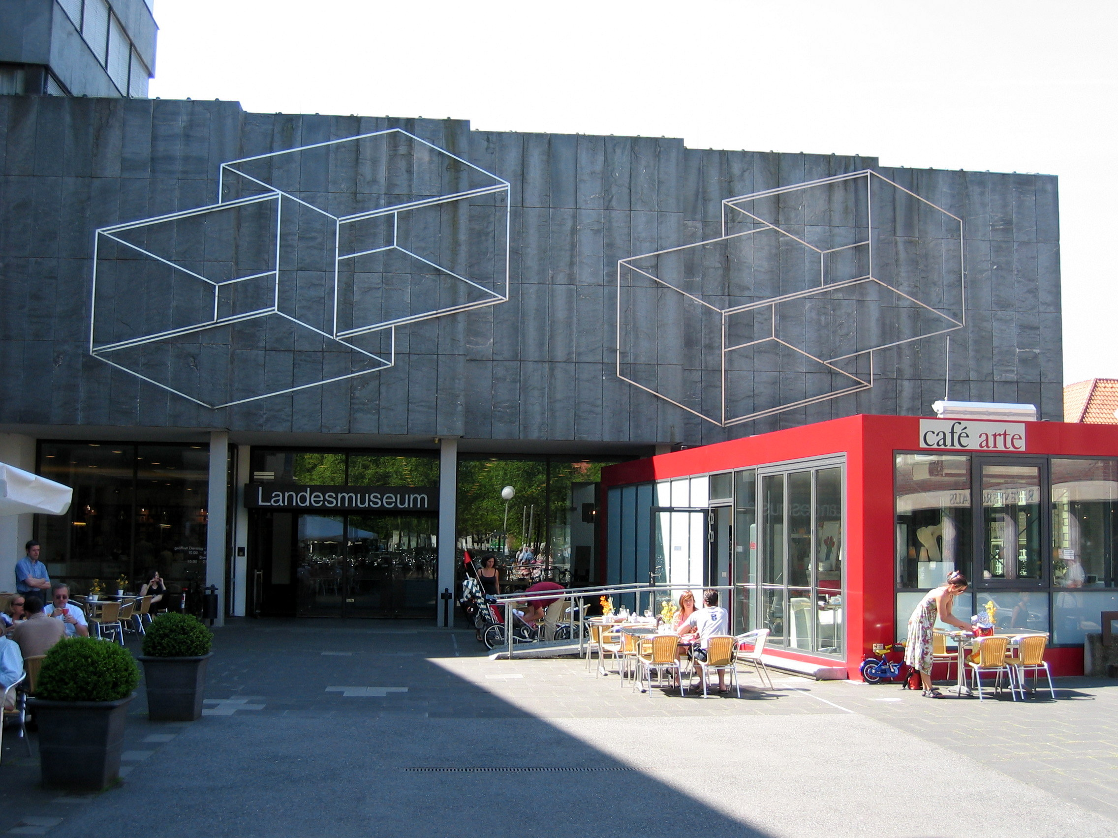 Alter Haupteingang des Landesmuseums für Kunst und Kultur in Münster (1974) mit den Zwei Supraporten von Josef Albers (Entwurf von 1972)